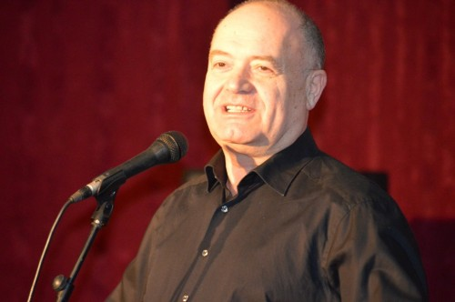 Forgács Gábor (Budapest, 1947. december 30. –) magyar színész, humorista, szinkronszínész.